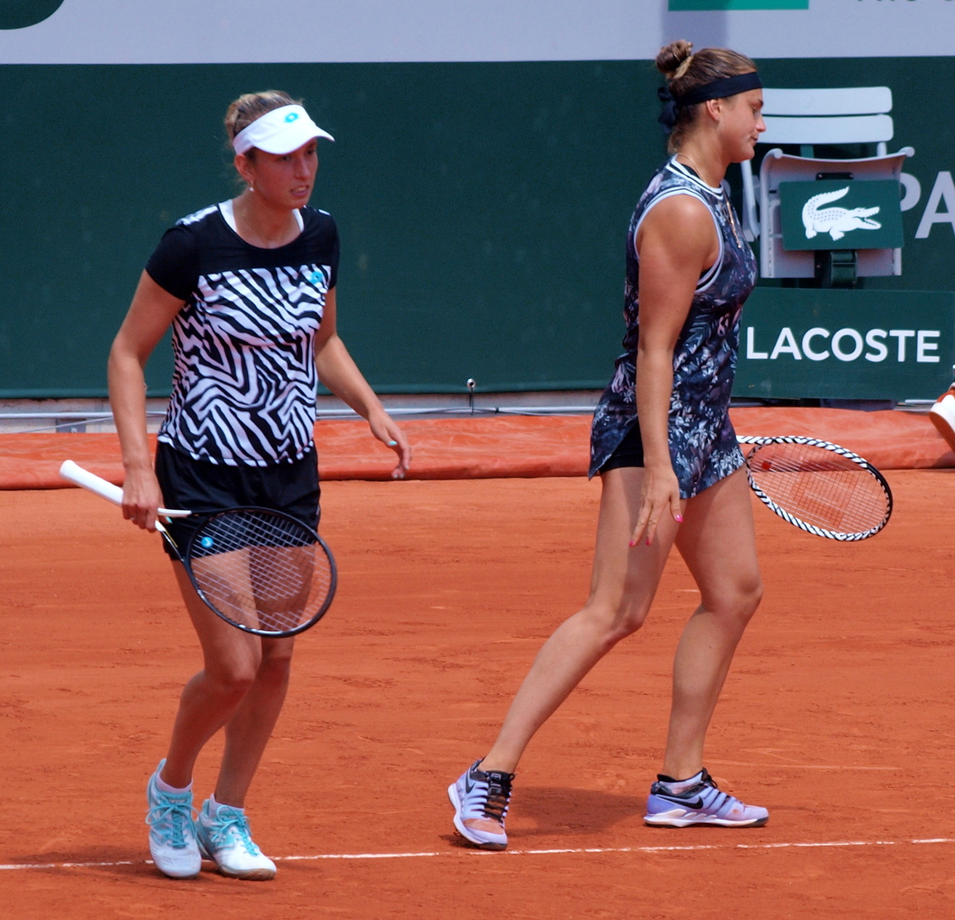 Internationnaux de France de Tennis 2019, au stade Roland Garros de Paris (France), sur le nouveau court Simonne-Mathieu : Double dames entre E. Mertens & A. Sabalenka d'une part et L. Kichenok & J. Ostapenko d'autre part, le jeudi 6 juin 2019